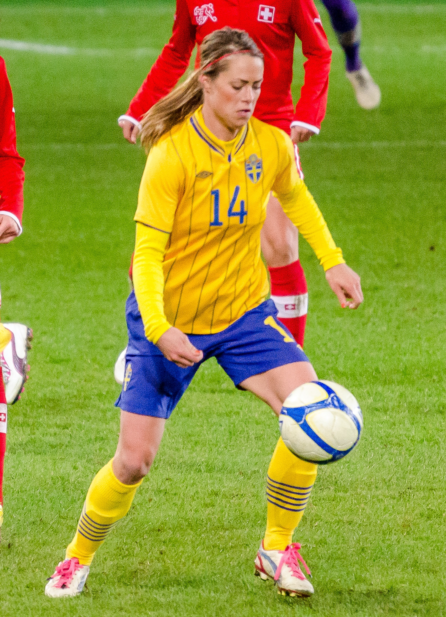 Den svenska mittfältaren Johanna Almgren i den första landskampen på Myresjöhus Arena (tillika Pia Sundhages debut som svensk förbundskapten) 23 oktober 2012, där Sverige slog Schweiz med 3-0 inför 4905 åskådare.